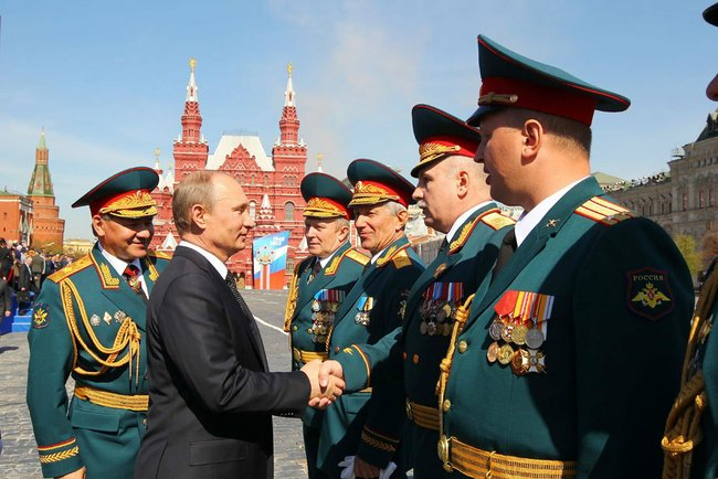 По окончании военного парада в ознаменование 68-й годовщины Победы в Великой Отечественной войне.